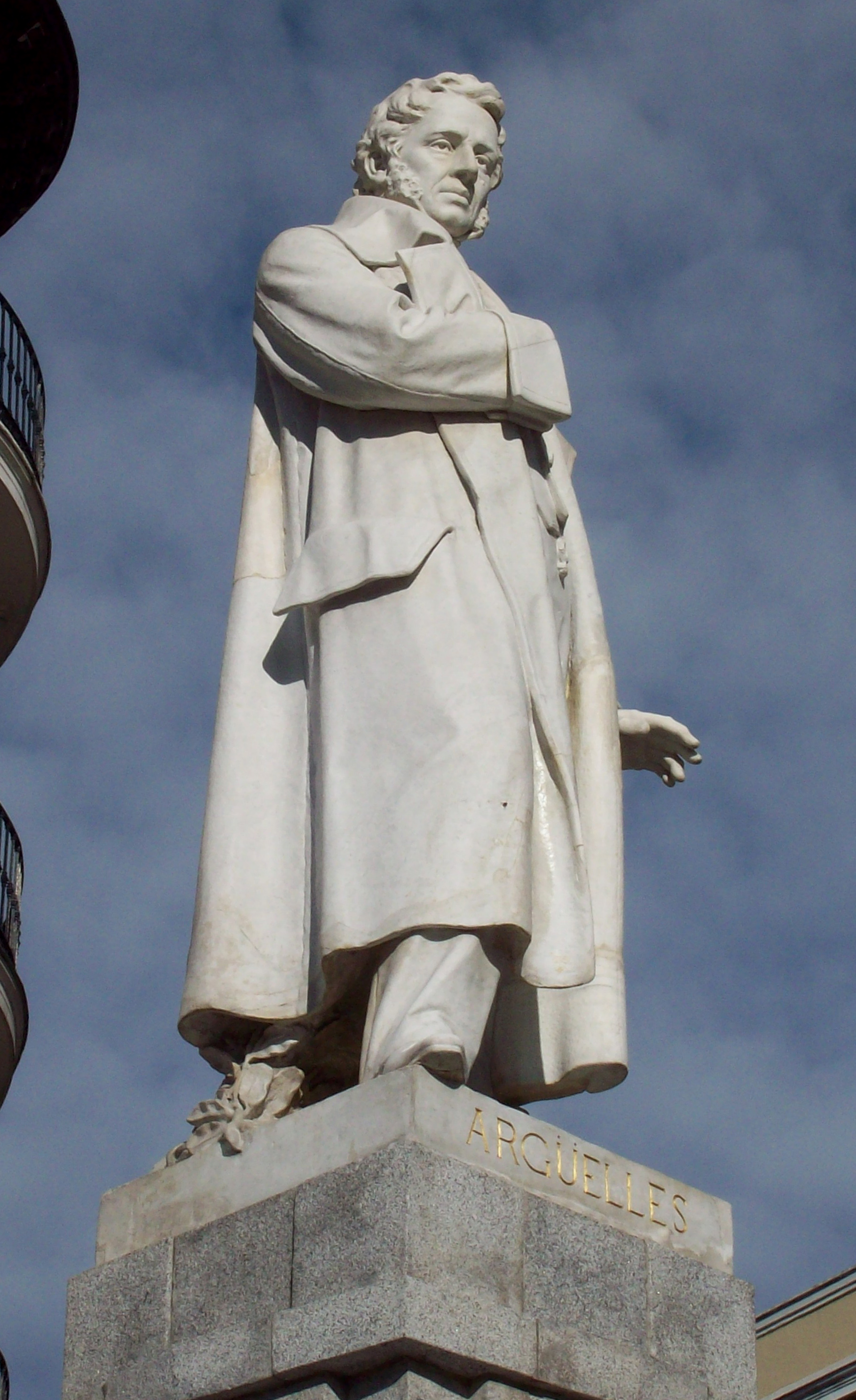 Statue of Agustín Argüelles